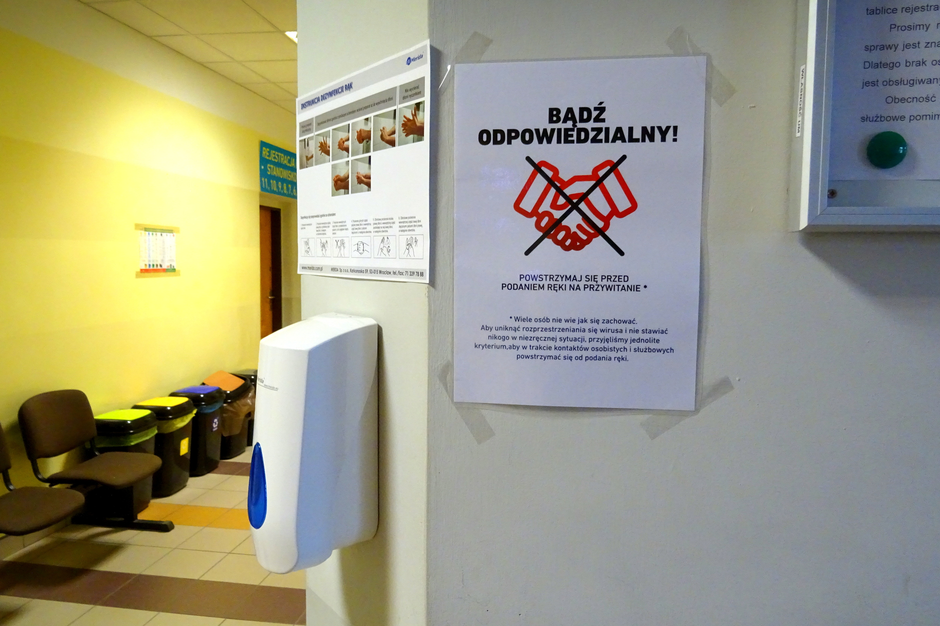 Siedziba urzędu publicznego. Dozownik środka dezynfekującego i informacje dotyczące odpowiednich zachowań w czasie pandemii.